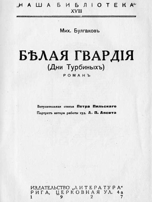 Издание романа М.Булгакова "Белая Гвардия", 1927